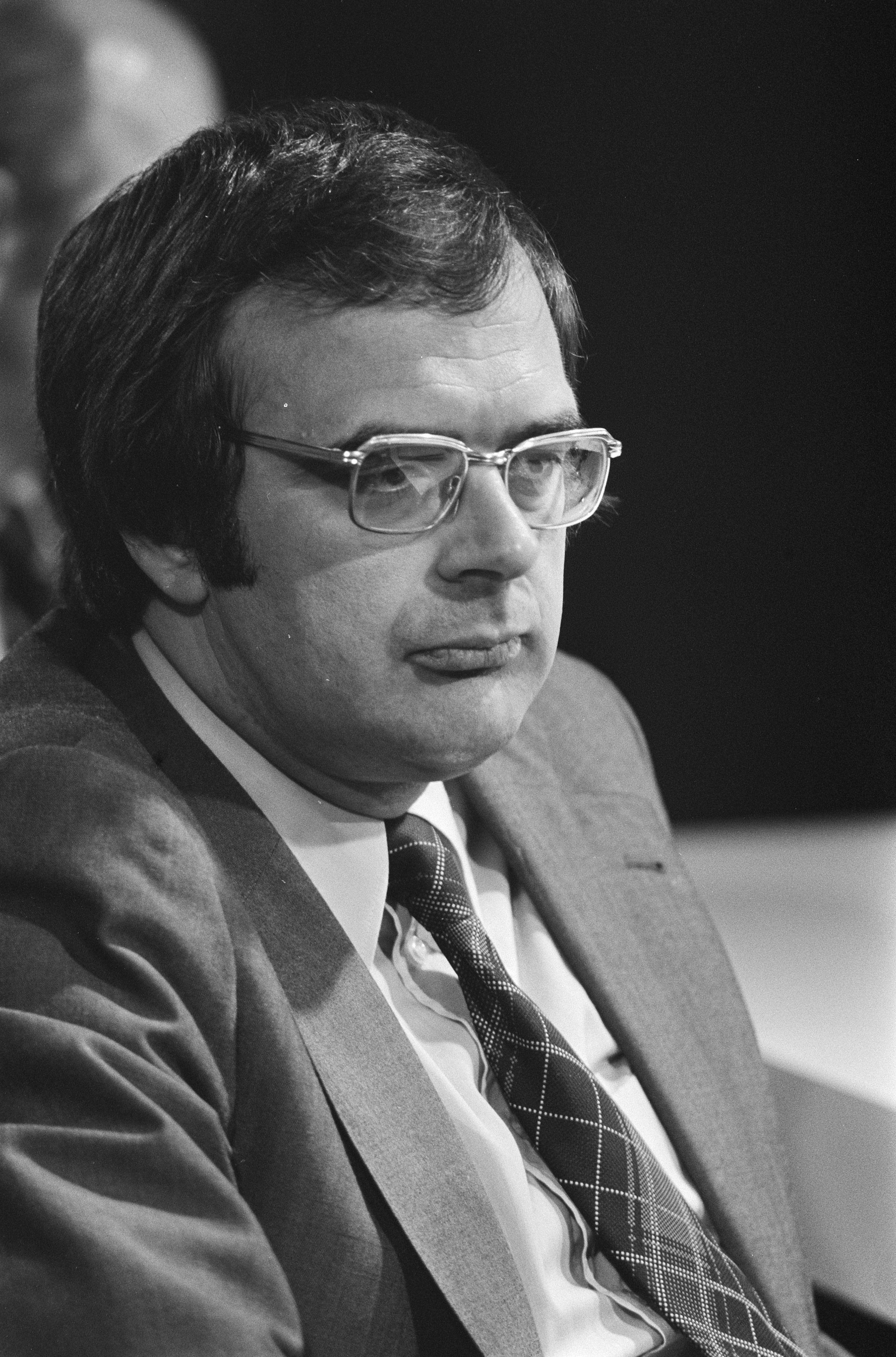 Collectie / Archief : Fotocollectie Anefo Reportage / Serie : Minister Pronk uit Paramaribo op Schiphol Beschrijving : Minister Pronk tijdens perconferentie Datum : 3 februari 1975 Locatie : Noord-Holland, Schiphol Trefwoorden : ministers, persconferenties, politiek Persoonsnaam : Pronk, Jan Fotograaf : Hans Peters / Anefo Auteursrechthebbende : Nationaal Archief Materiaalsoort : Negatief (zwart/wit) Nummer archiefinventaris : bekijk toegang 2.24.01.05 Bestanddeelnummer : 927-7298